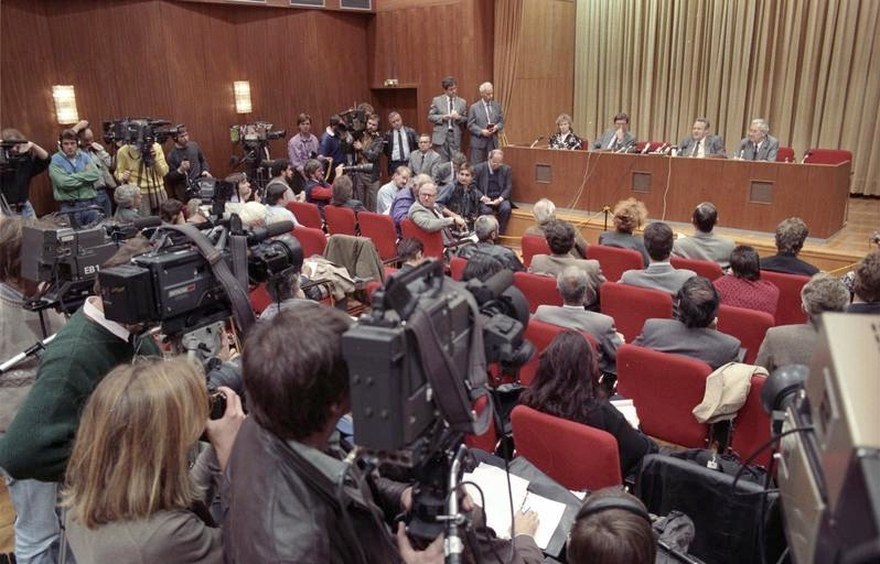 ADN-ZB/Lehmann/ 9.11.89/Berlin: Pressekonferenz/ Günter Schabowski, Mitglied des Politbüros und Sekretär des ZK der SED, informierte im Internationalen Pressezentrum über Verlauf und Ergebnisse des zweiten Beratungstages des 10. Plenums des ZK der SED. Günter Schabowski stand den in- und ausländischen Journalisten Rede und Antwort.